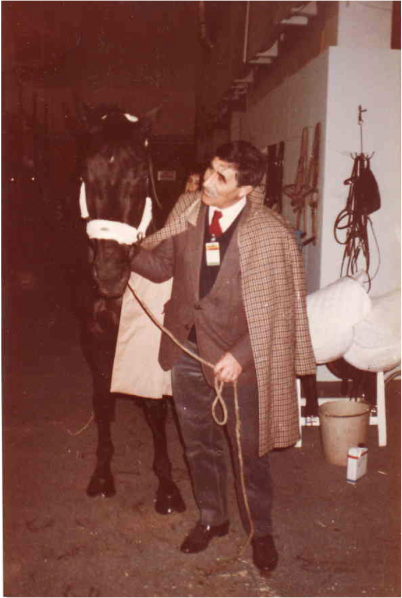 Jappeloup sortant des boxes en suède tenu par Henry Delage